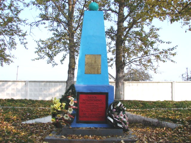 Памятник евреям - жертвам Холокоста в деревне Василишки Щучинского района Гродненской области. Установлен в 1967 году.